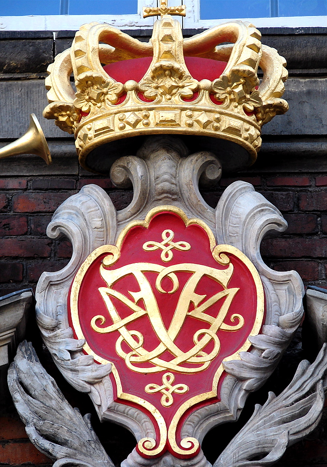 Frederik IV af Danmark og Islands og Norges monogram, ved Christiansborg, København